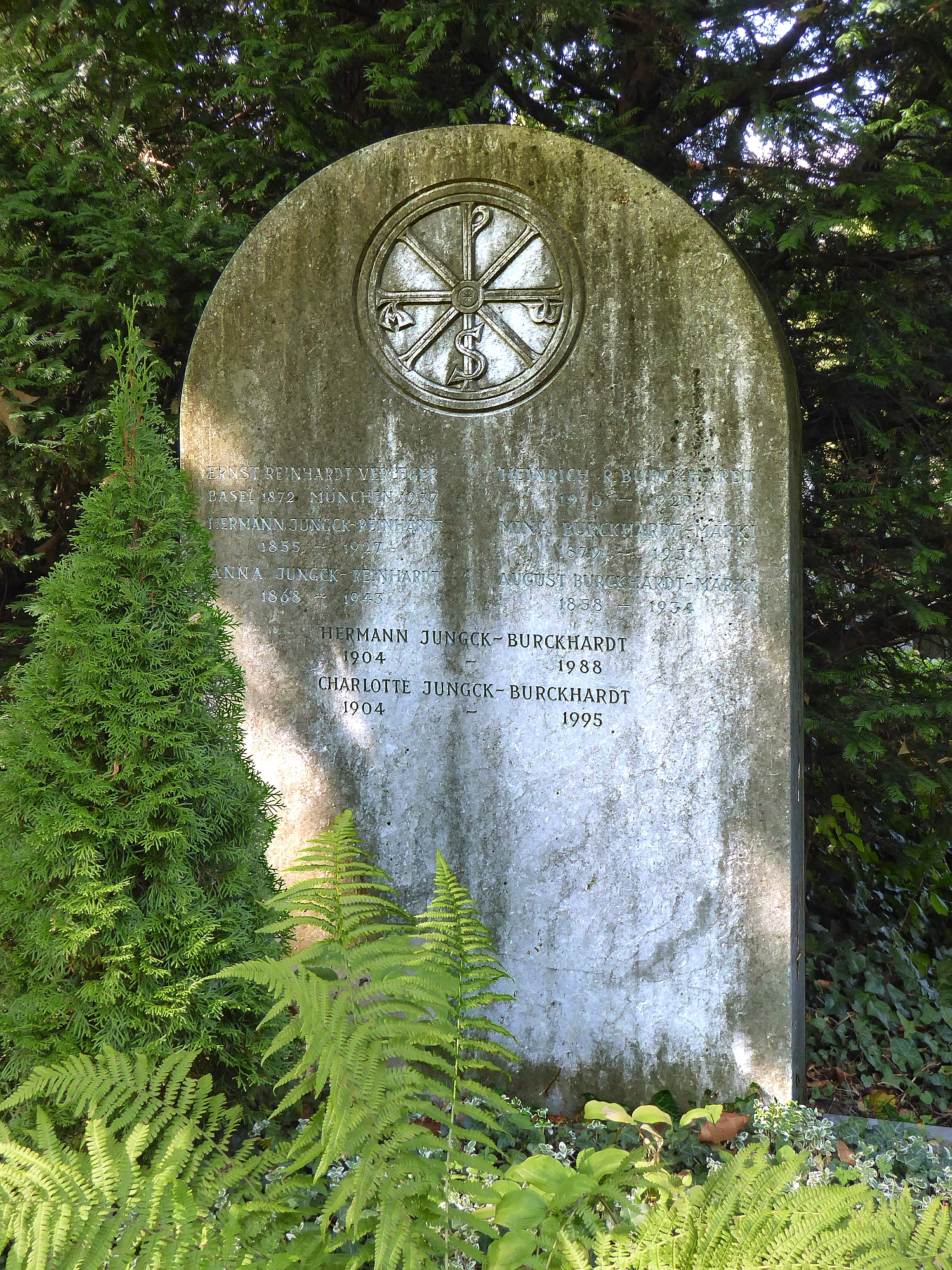 Ernst Reinhardt (1872–1937) Buchhändler, Verleger und sein Neffe Hermann Jungck-Burckhardt (1904–1988), Grab auf dem Friedhof Wolfgottesacker, Basel